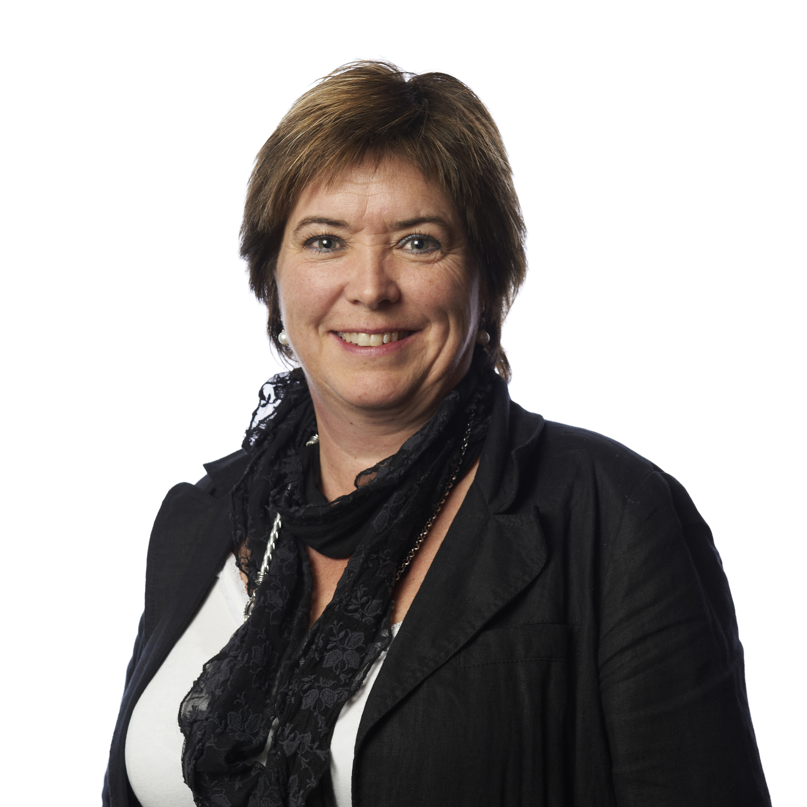 Marianne Sandahl Bjorøy, Arbeiderpartiet , kultur- og ressursutvalet